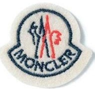 Logo della Moncler preso da un giubotto ed elborato